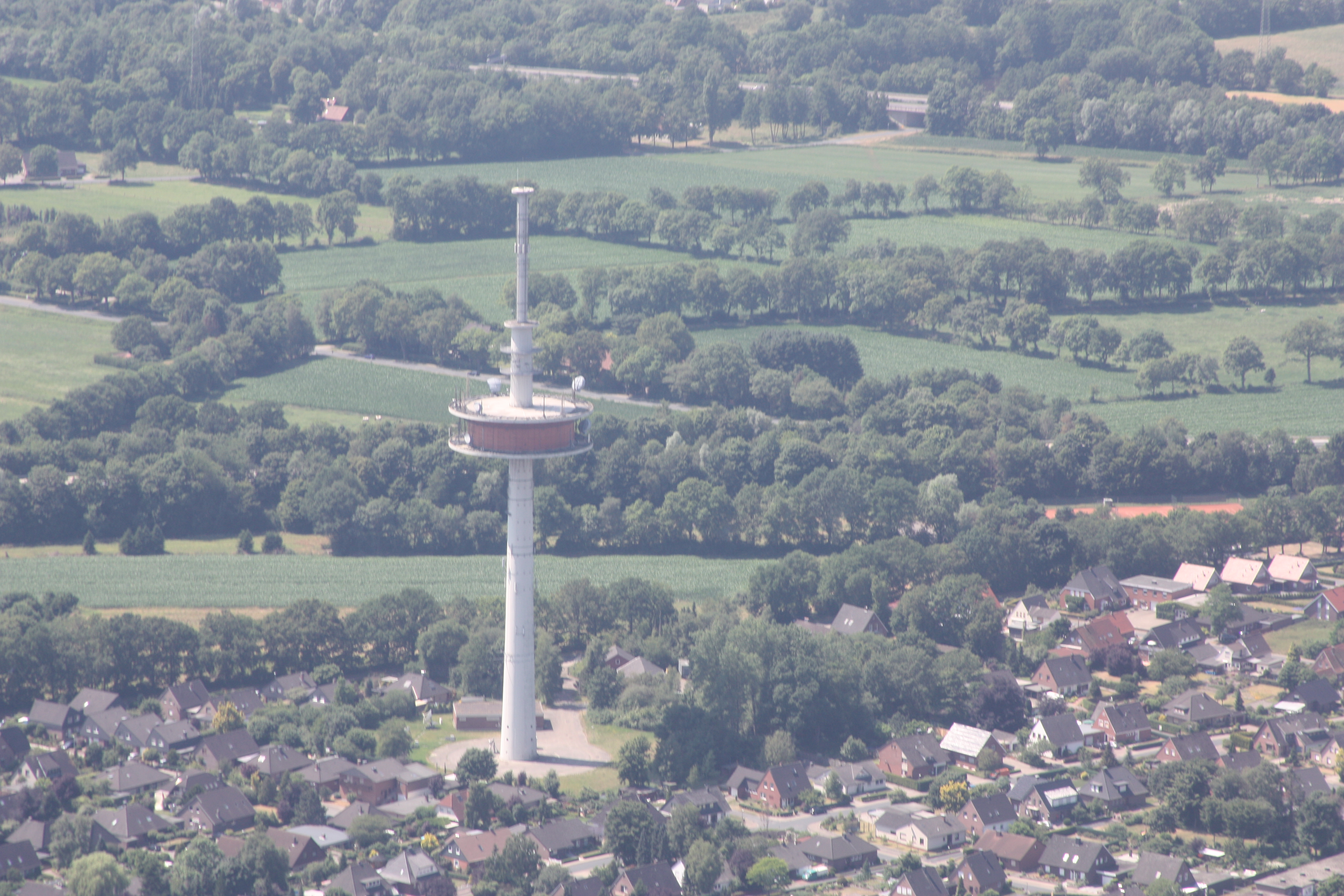 Flug über Oldenburg; von Wilhelmshaven kommend nach Hatten; Flughöhe 500 m = 1500 ft; Juli 2010